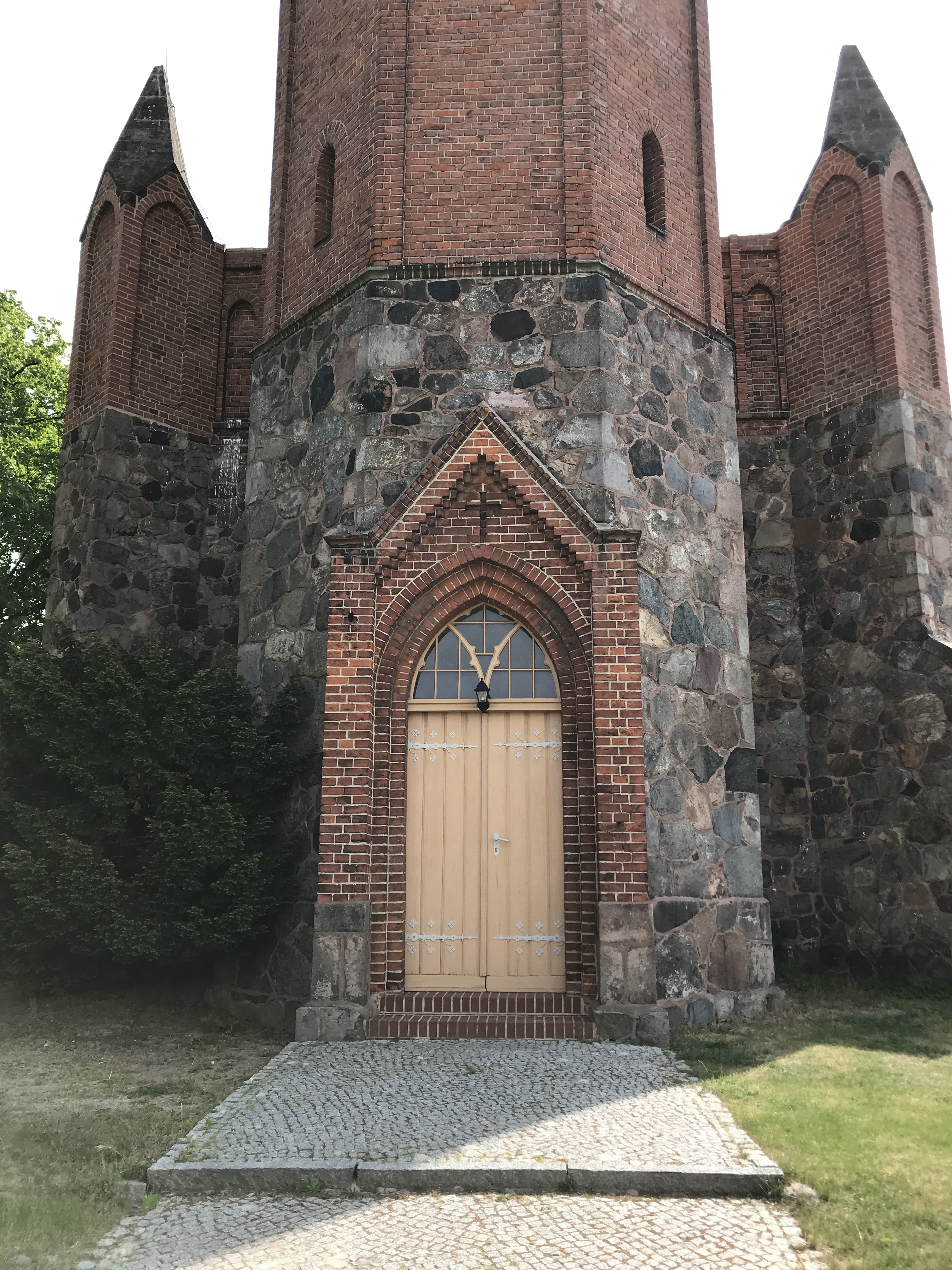 Die Dorfkirche Bochow ist eine gotische Feldsteinkirche in Bochow, einem Ortsteil der Gemeinde Niedergörsdorf in Brandenburg. Im Innern steht unter anderem ein Altaraufsatz von Gottfried Patzsch(en) aus dem Jahr 1701.